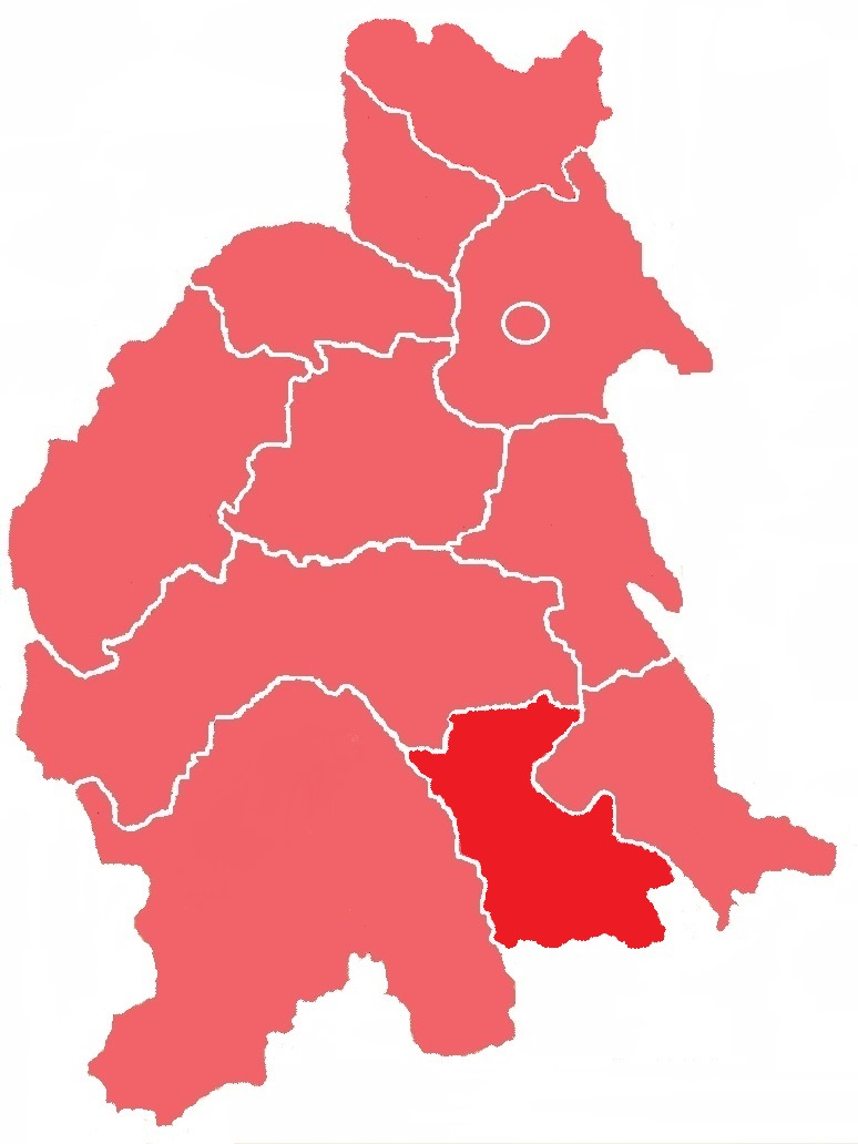 Гурагуморський повіт